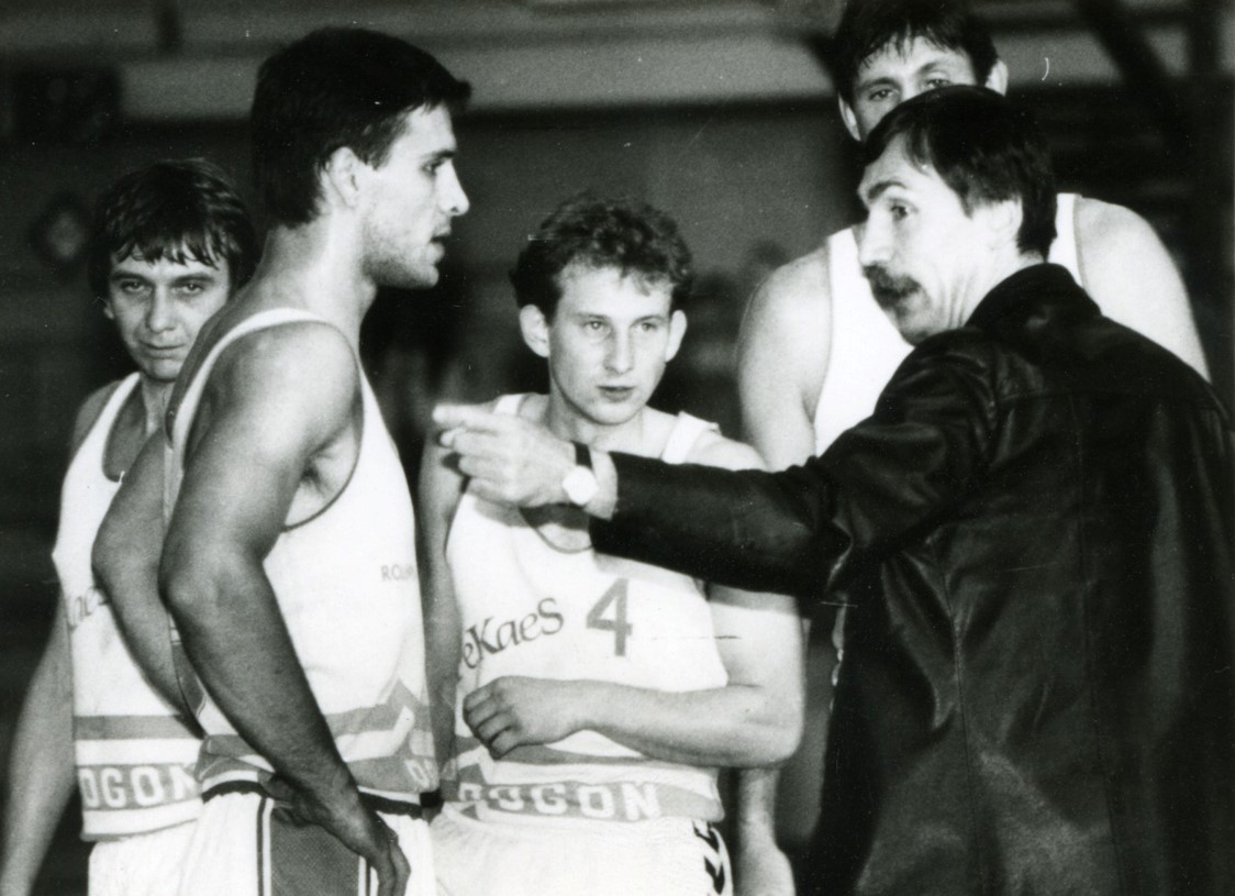 Aleksiej Agapiejew, koszykarz pierwszoligowych klubów moskiewskich CSKA Moskwa i Dynamo Moskwa, w latach 1991-1994 trener Pogoni Prudnik.